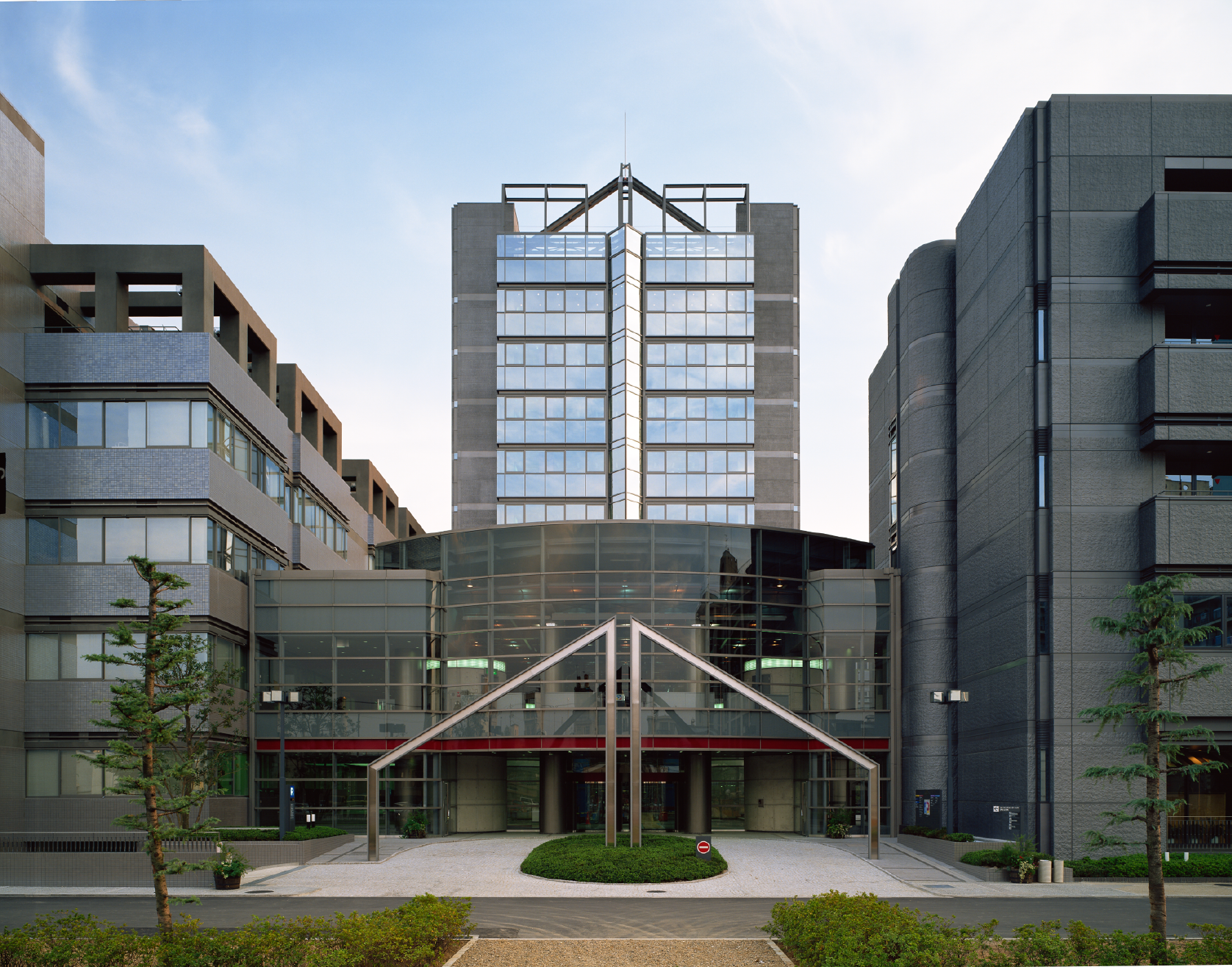 ASTEM